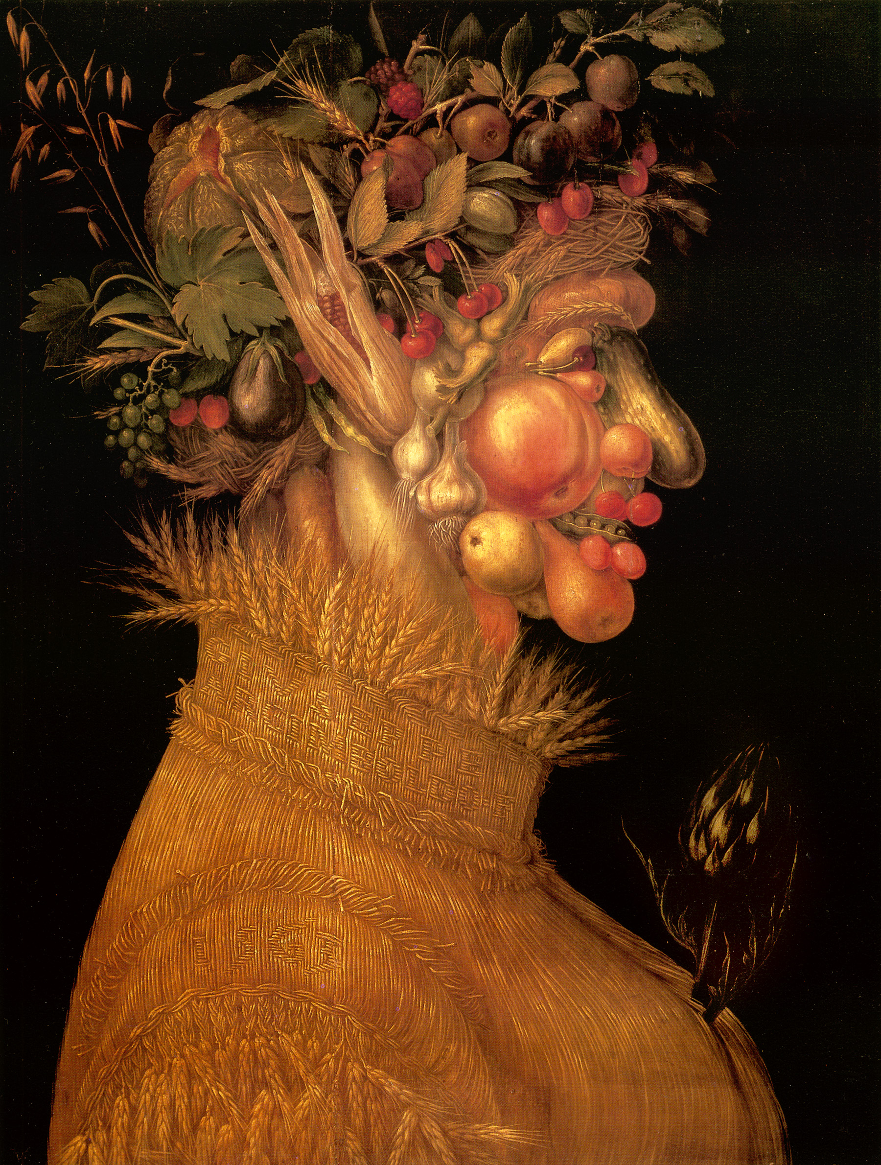 The Summerlabel QS:Len,"The Summer" label QS:Lde,"Der Sommer"